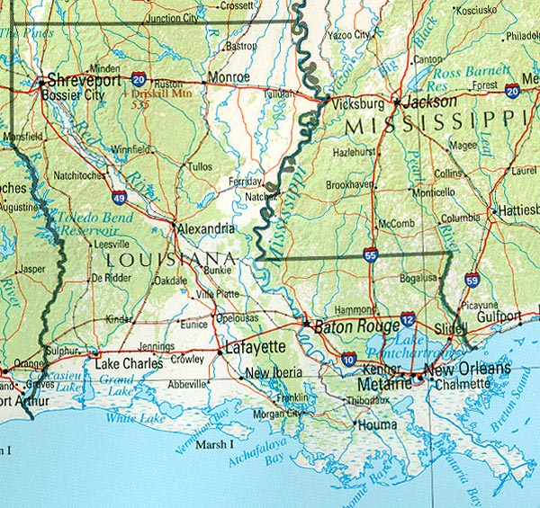 Karte Louisianas. Perry Castaneda Library.=: Referenzkarte des US-Bundesstaates Louisiana